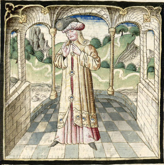 ChampionDesDames-Grenoble-Ms0352-f055r